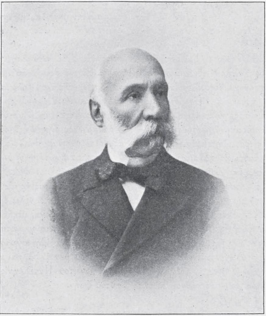 griechischer Regierungspolitiker, 1896